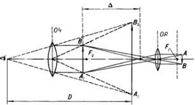 մանրադիտակ